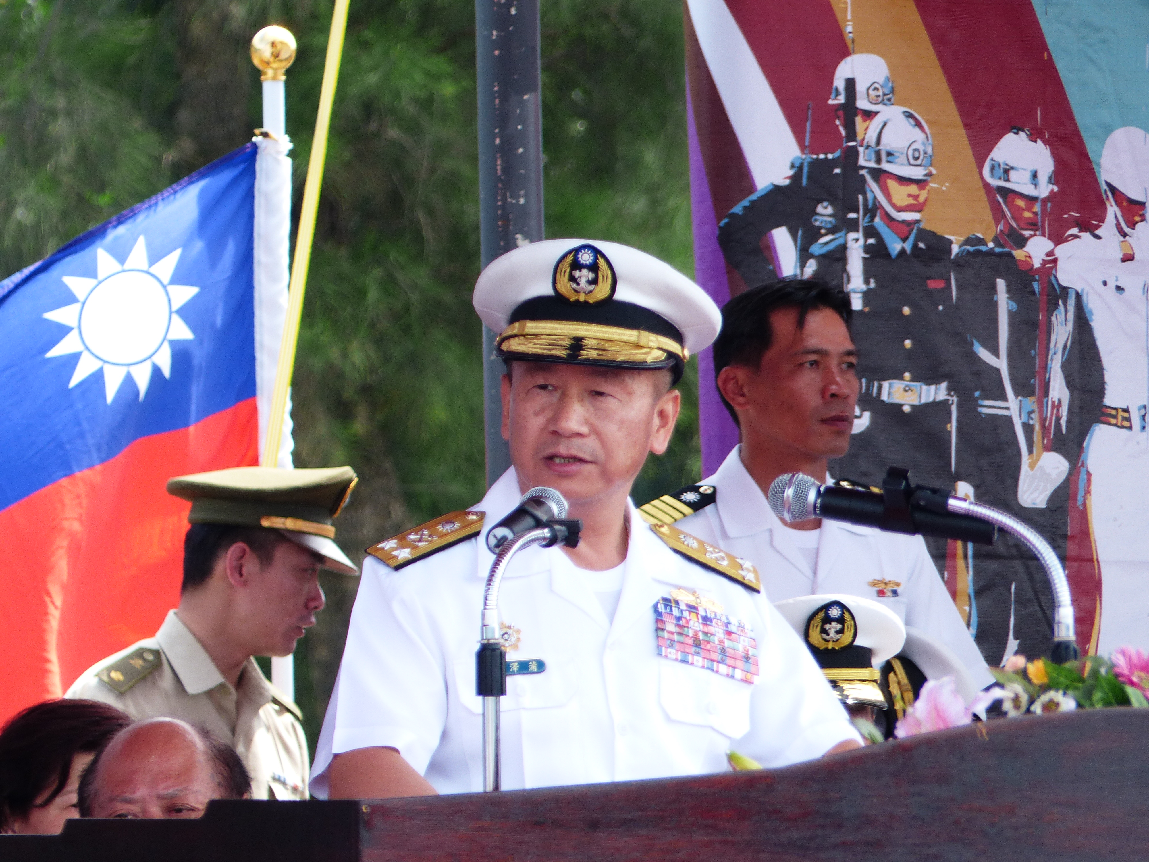 2013年中正軍港營區開放活動開幕式，中華民國海軍艦隊指揮部司令蒲澤春中將致辭。